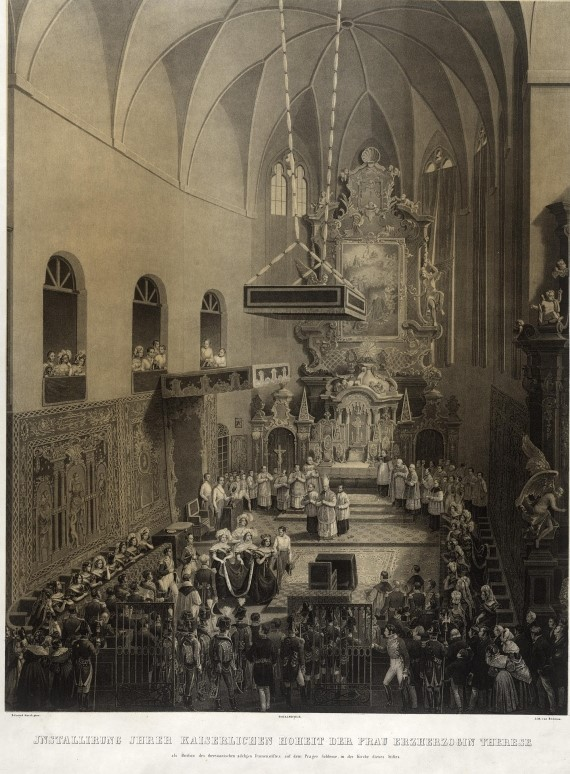 Anlässlich der Krönung von Kaiserin Maria Anna zur Königin von Böhmen, erfolgte die Einsetzung von Erzherzogin Therese am 9. 9. 1836 als Äbtissin des adeligen Hradschiner Damenstiftes zu Prag. Unter dem Baldachin ist Erzherzog Franz Carl dargestellt. Die Äbtissin hatte das Recht die die Königin von Böhmen zu krönen. Lithographie von Bremms (welcher?), nach Aquarell von Eduard Gurk.